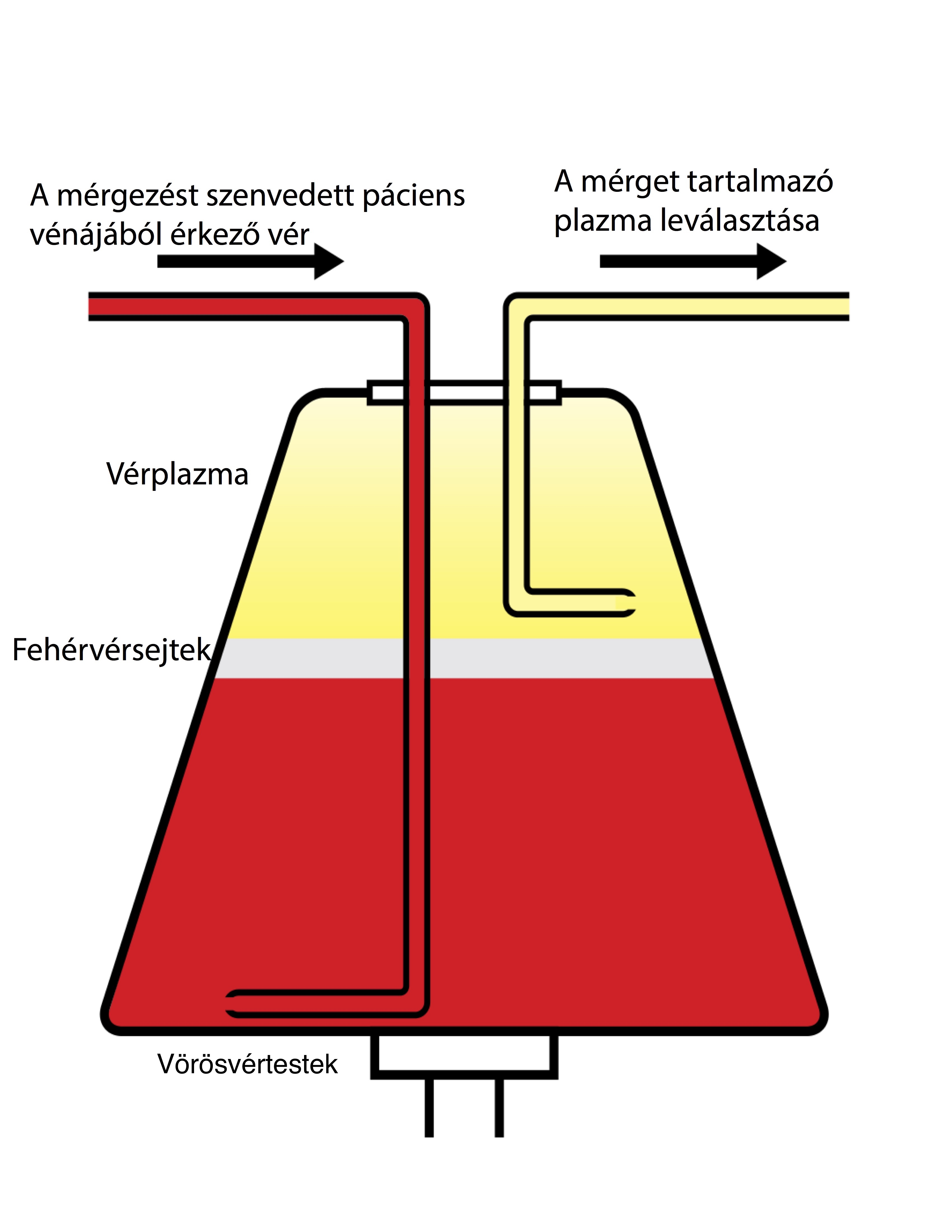 Apheresis rotor vázlat